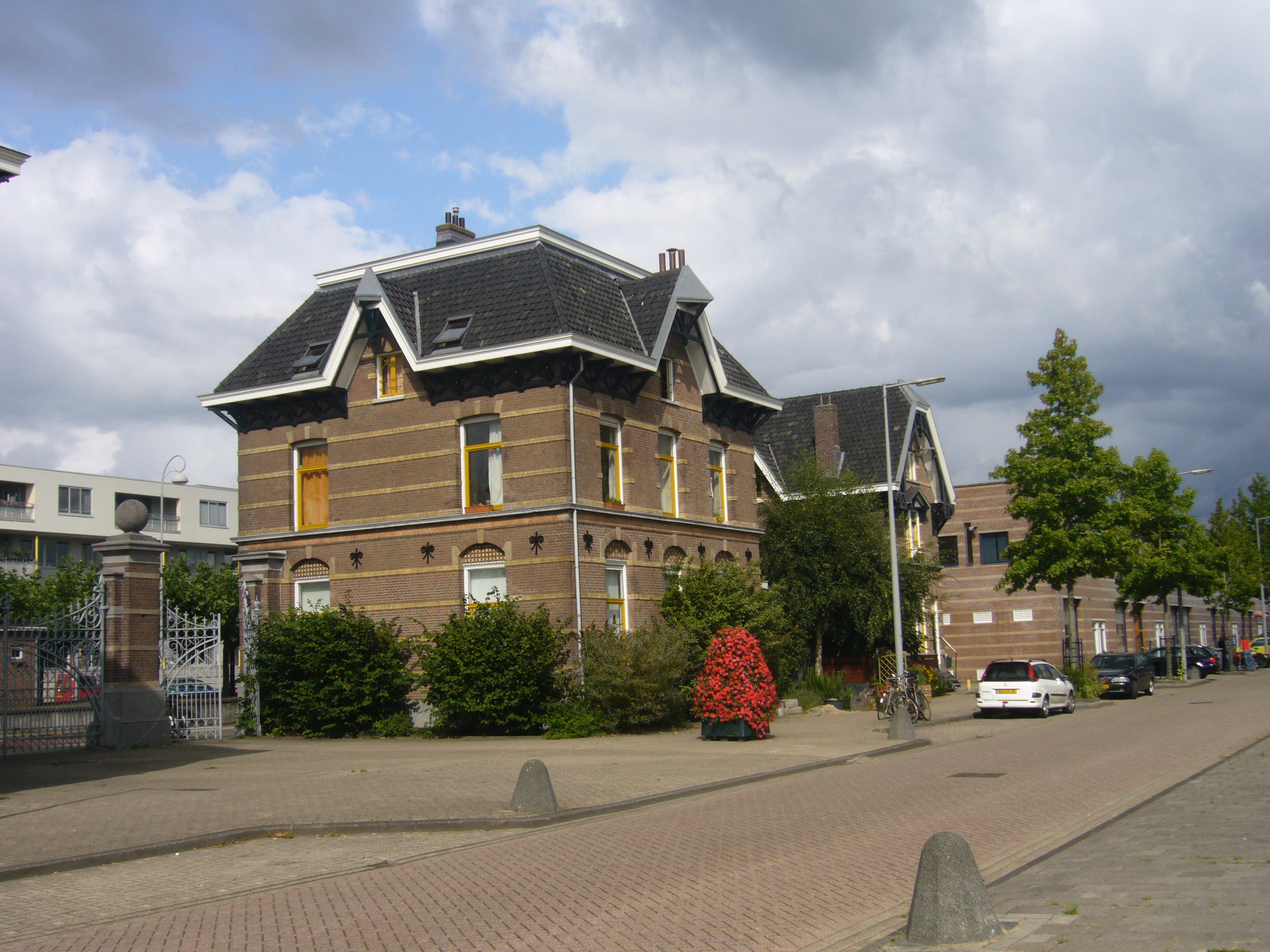 Veemarkt Amsterdam huis uit 188, ernaast modernere bedrijfspanden met dezelfde gele randen.